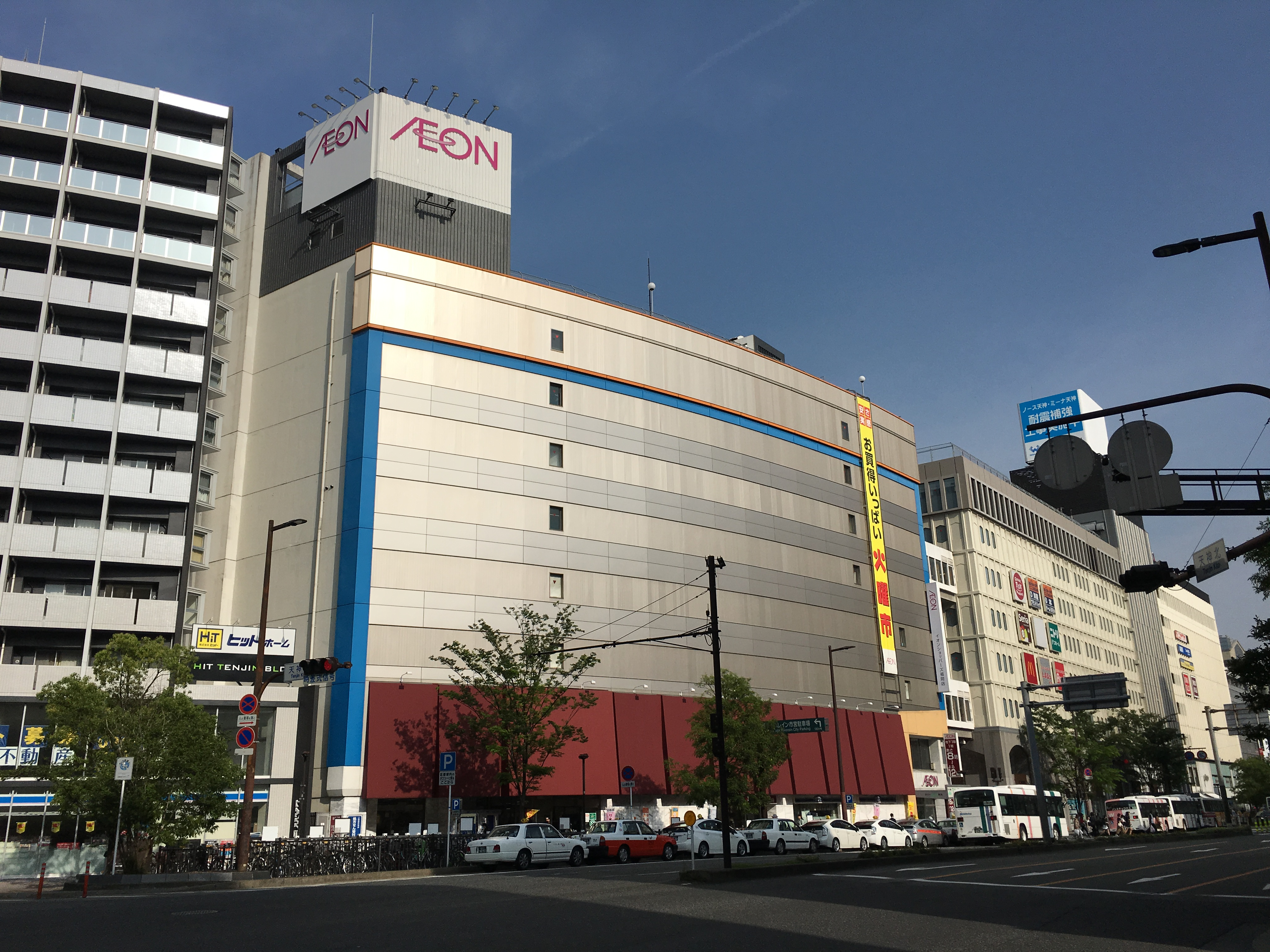 イオンショッパーズ福岡店（福岡市中央区天神）